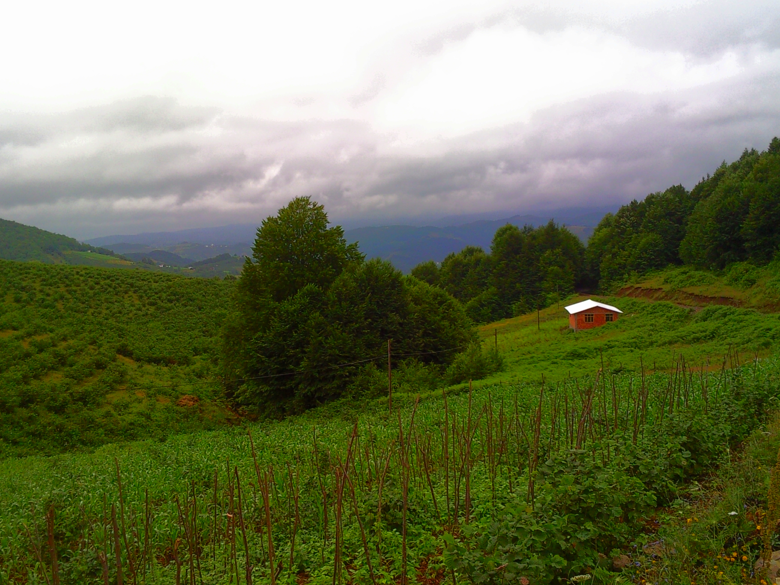 Salman köy yolundan bir görünüm ve yol üzerindeki kulübe.